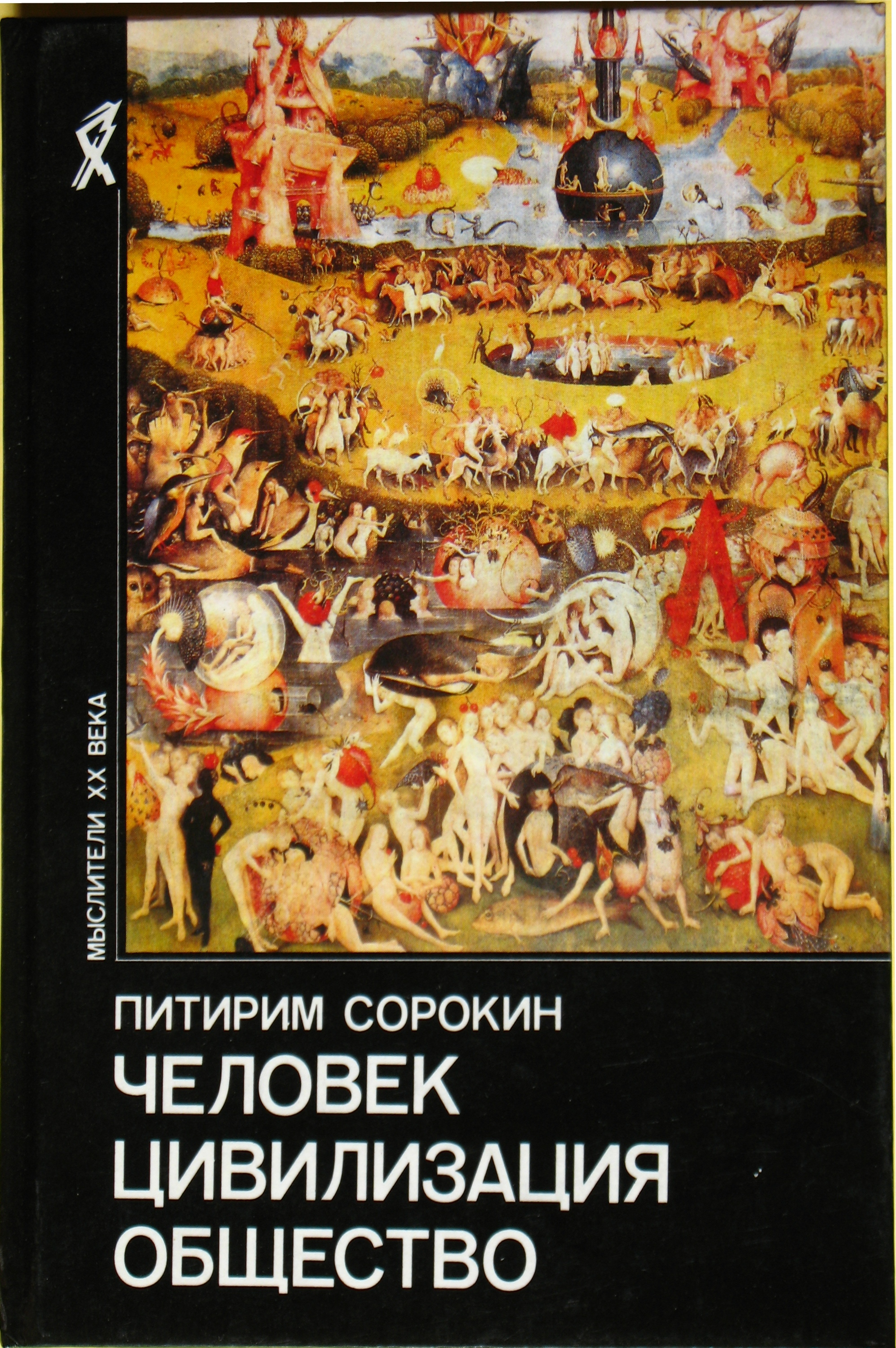 Pitirim Sorokin book. Painting by Hieronymus Bosch. Серия "Мыслители XX века". Сорокин Питирим, "Человек. Цивилизация. Общество." Москва, Политиздат, 1992, тираж 60 000, 544 стр., цена 8 руб. 40 коп. Обложка - картина Иеронима Босха.